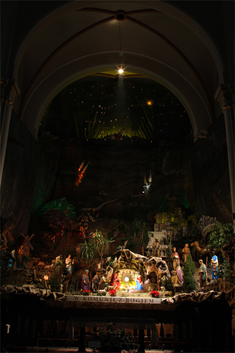 Crib in Katowice Panewniki, Poland (2010)